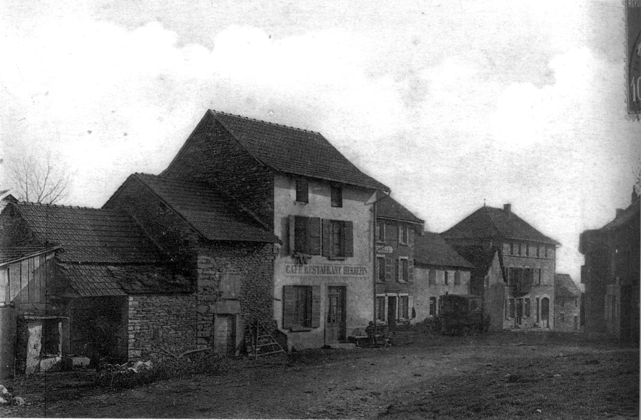 Saint-Baudille de-la-Tour, 1907, p188 de L'Isère les 533 communes.jpg